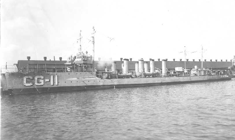 USS Fanning (DD-37)